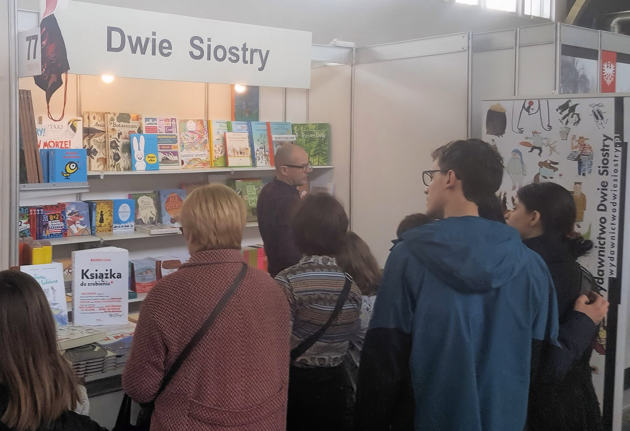 Wydawnictwo Dwie Siostry, Poznańskie Targi Książki 2018